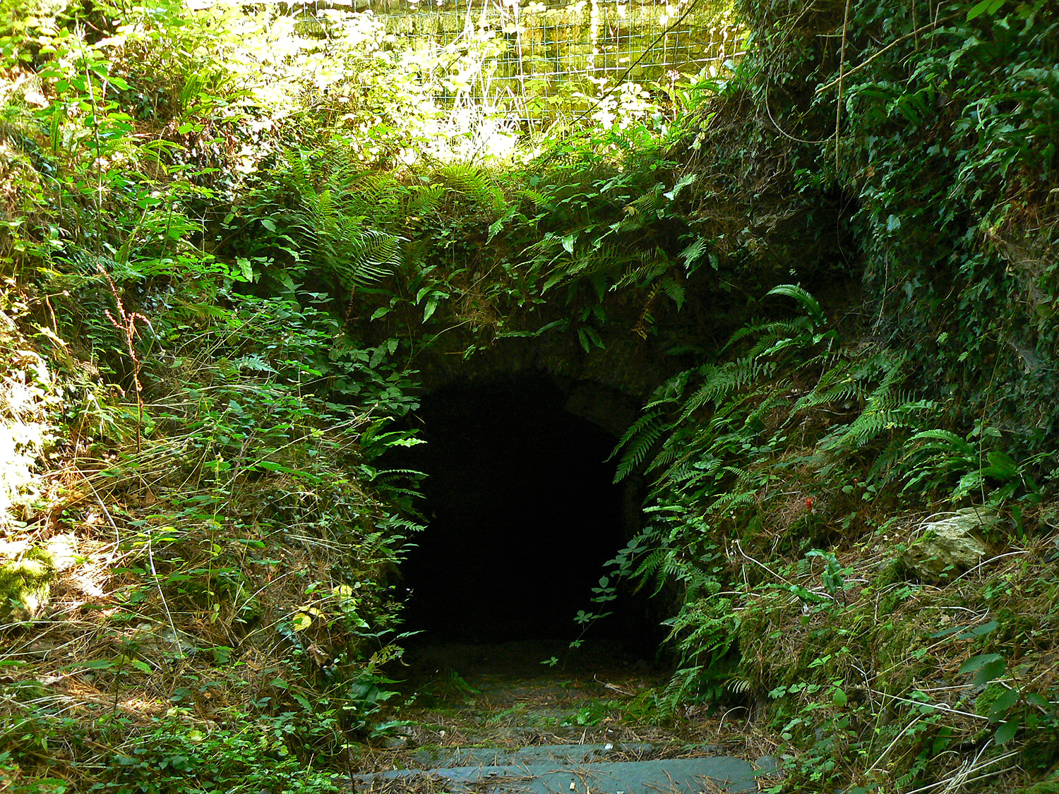 le château de la Joyeuse Garde, anciennement le château de la douloureuse Garde